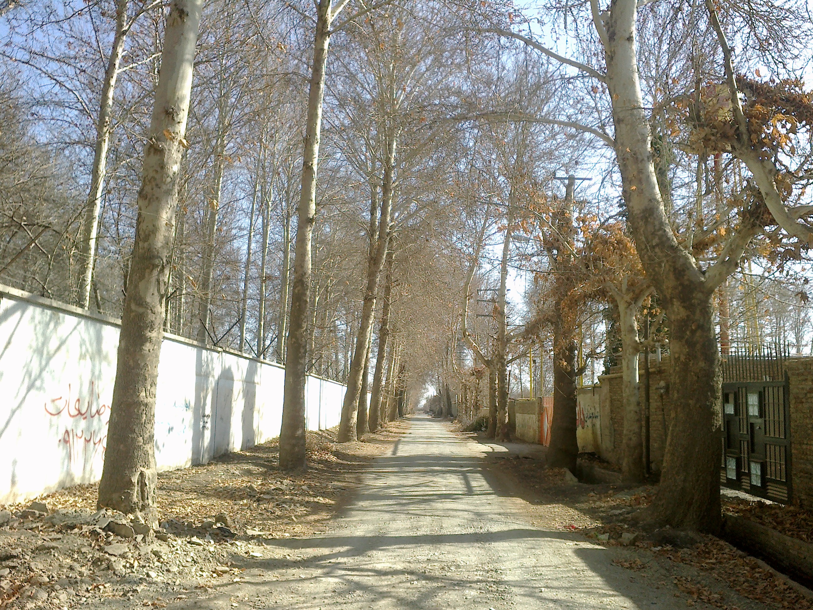 Mihan street deeper to east (closer view)